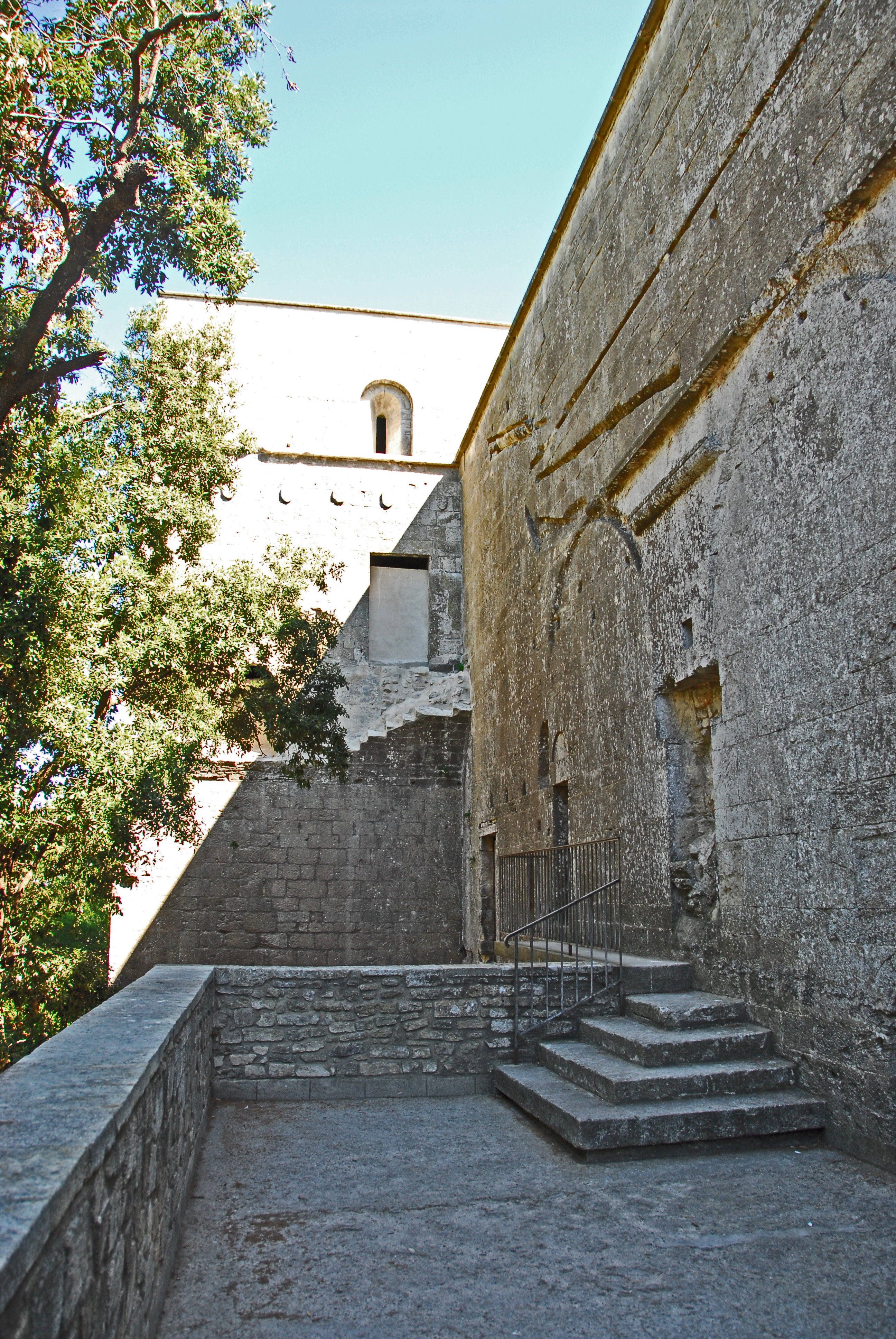 St-Pierre-et-St-Paul de Maguelone, Nordseite des Hauptschiffs nach O